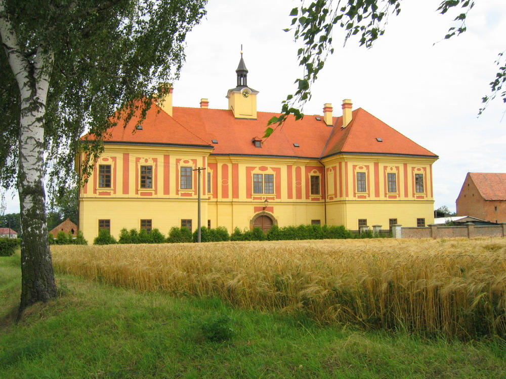 Zámek Sloupno, okres Hradec Králové. Západní průčelí.